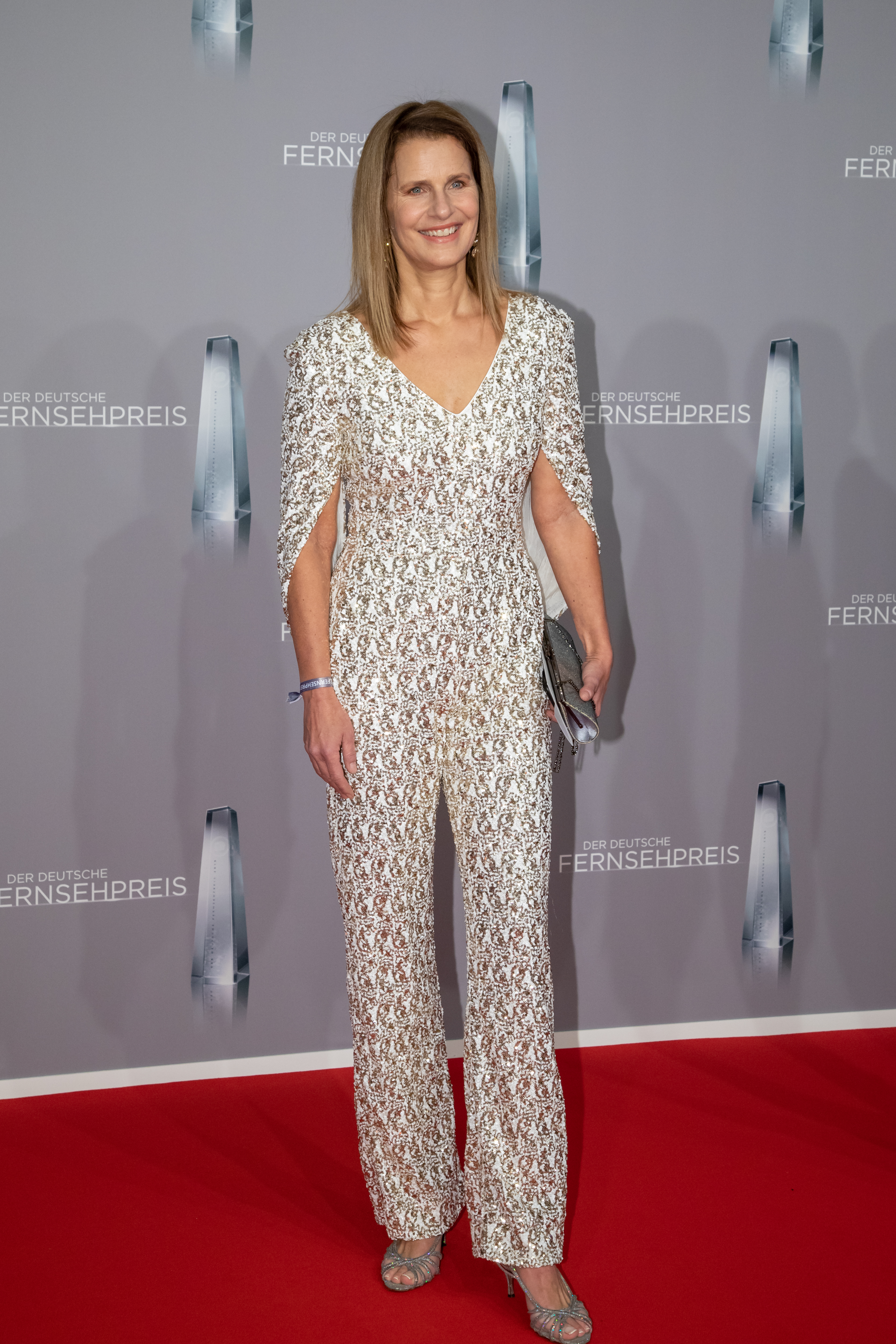 Katrin Müller-Hohenstein beim Deutschen Fernsehpreis 2019 in der Düsseldorfer Rheinterrasse